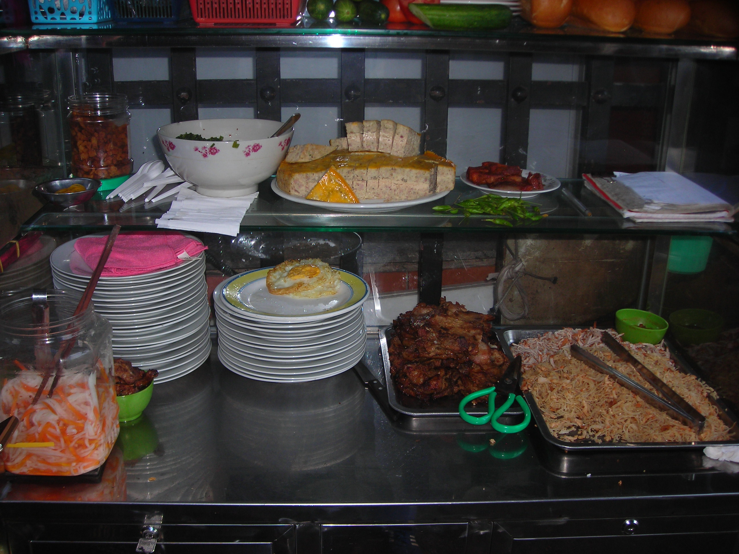 Étagẻre avec lardons, bì chả, oeuf, etc ...